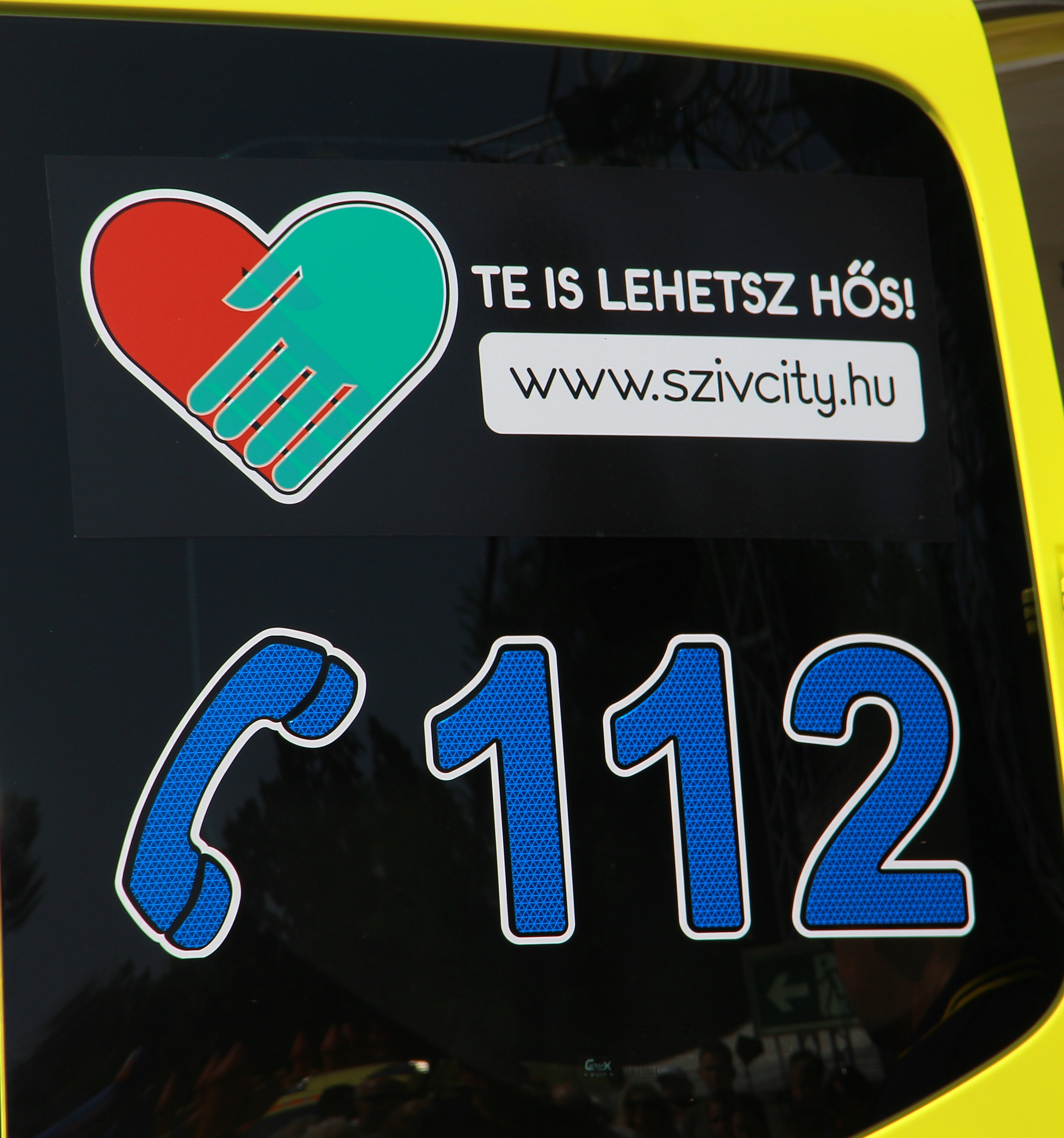 Te is lehetsz hős